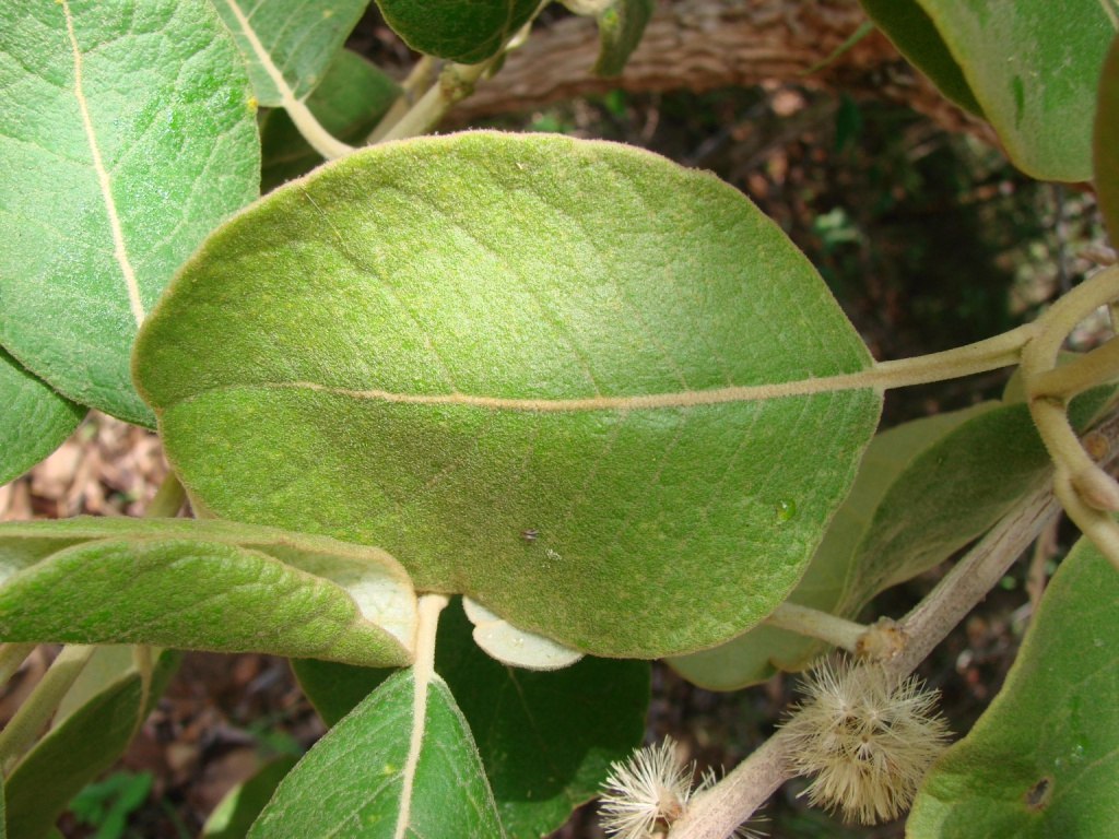 Piptocarpha rotundifolia - ASTERACEAE Jardim Botânico de Brasília - Distrito Federal - Brasil.